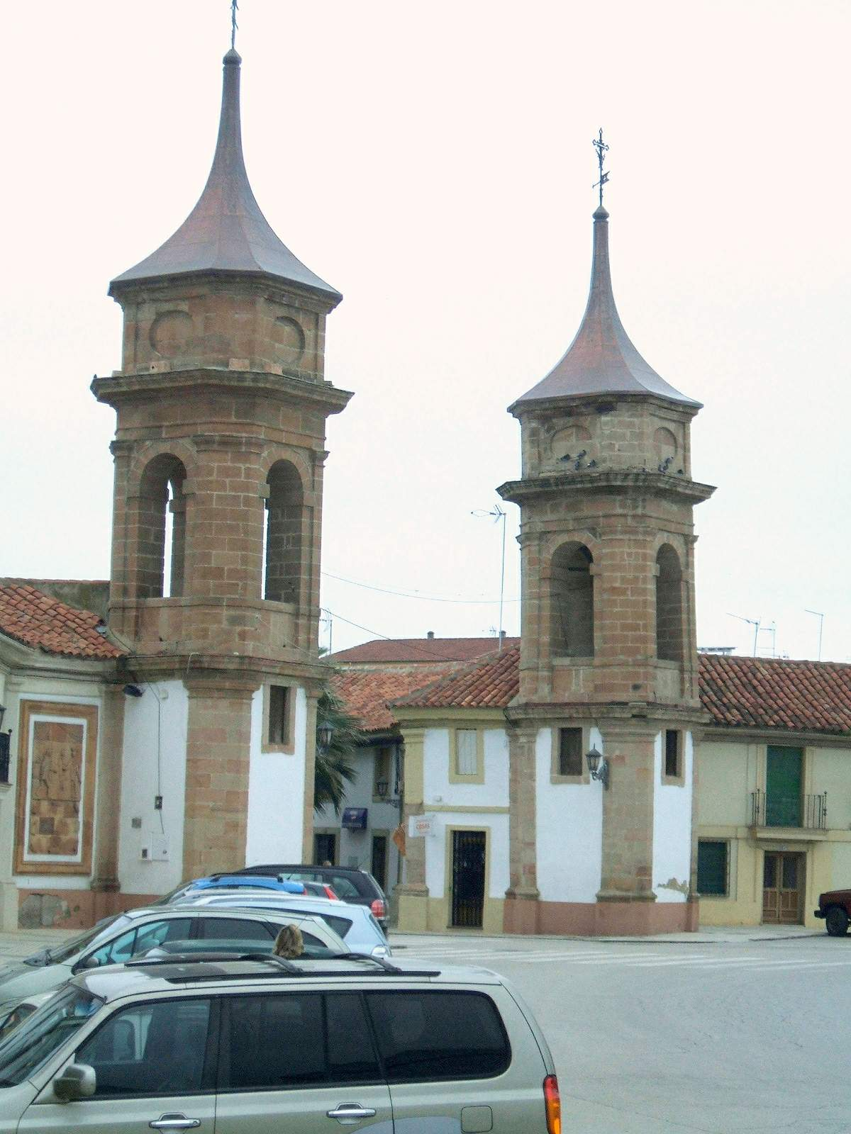 La Carolina (Jaén)